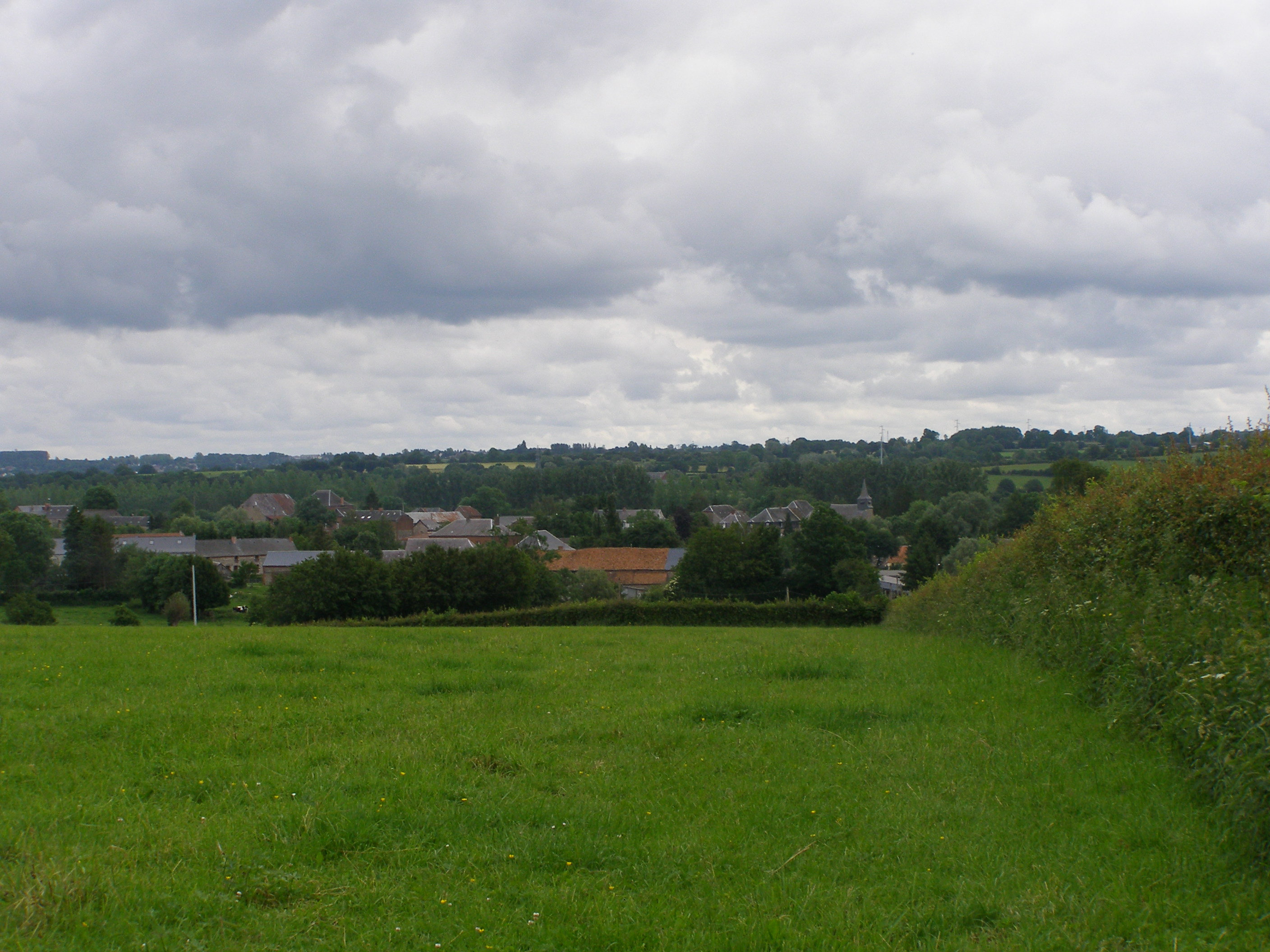 Vue d'ensemble.